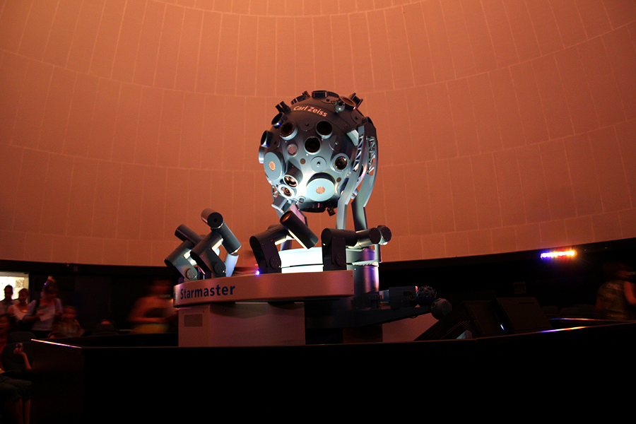 Musée de la découverte, Paris (planetarium)